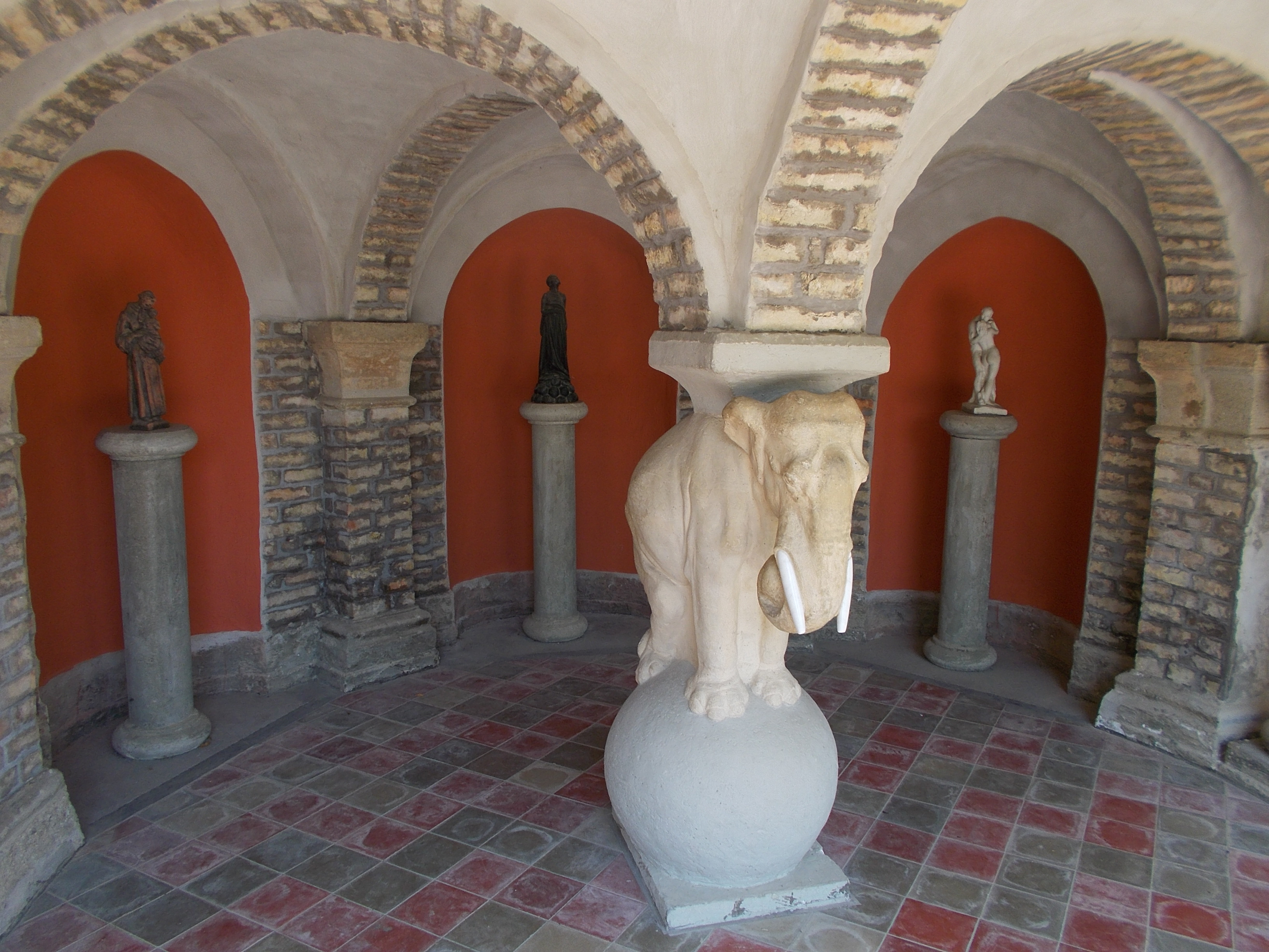 Bory vár. Elefántudvar. A névadó (gömbön álló, a várat a hátán tartó) elefánt szobra. - Magyarország, Fejér megye, Székesfehérvár, Öreghegy, Máriavölgy út 54